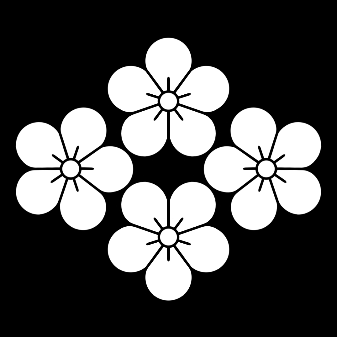 「四つ梅」紋（染抜）